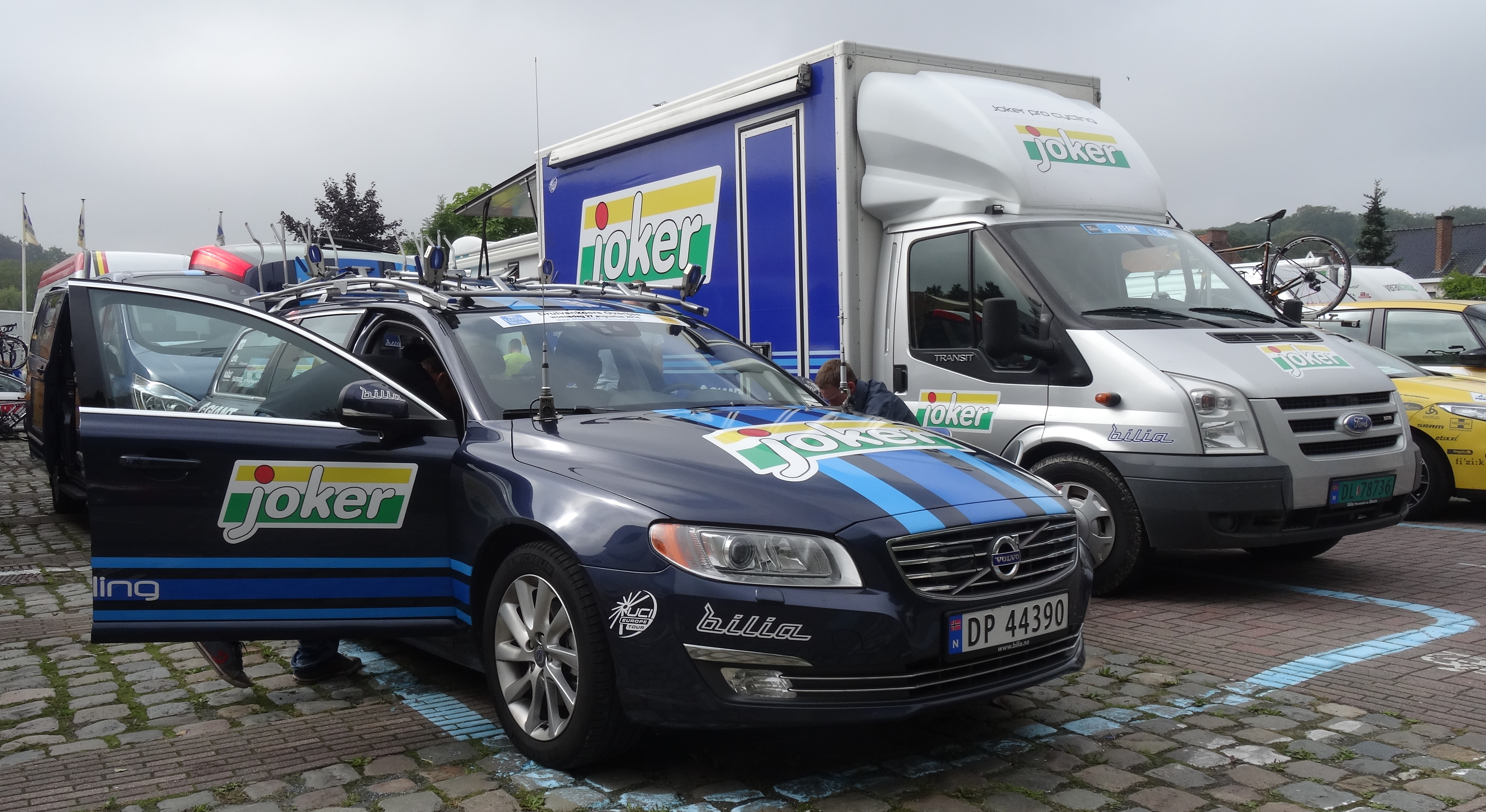 Reportage photographique réalisé le mercredi 27 août à l'occasion du départ de la Druivenkoers Overijse 2014 à Huldenberg, Belgique.